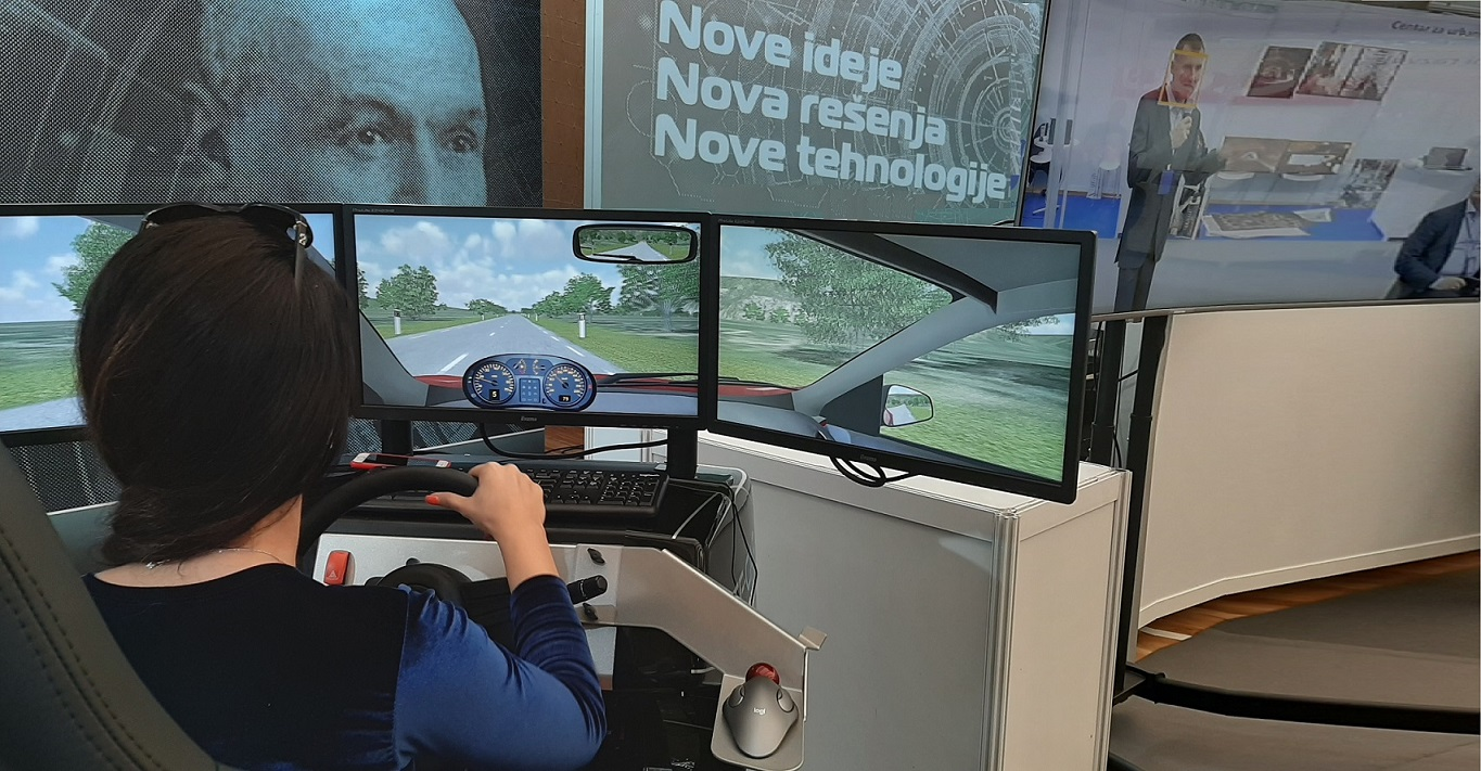 Simulator vožnje